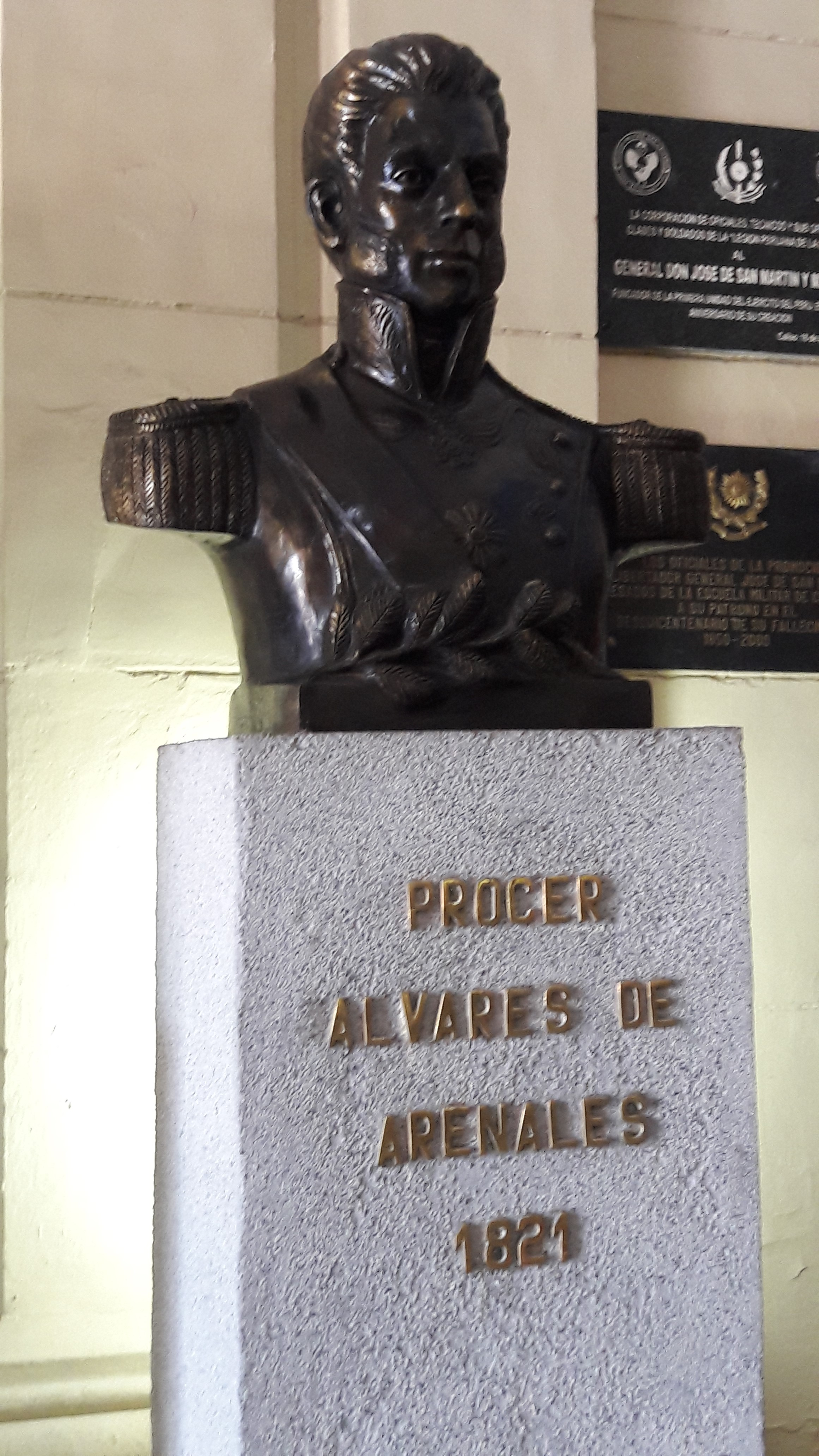 Prócer Alvares de Arenales 1821